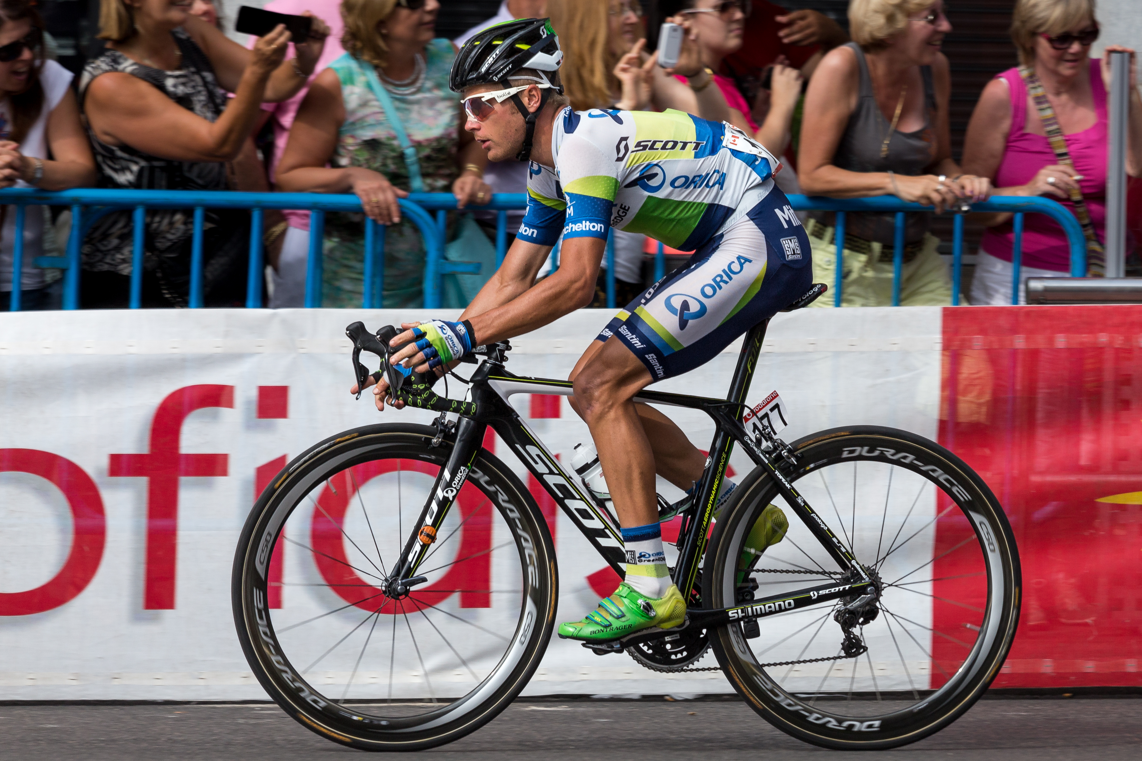 Christian Meier (#177/Orica GreenEDGE). Última etapa de la Vuelta a España 2013. Madrid.